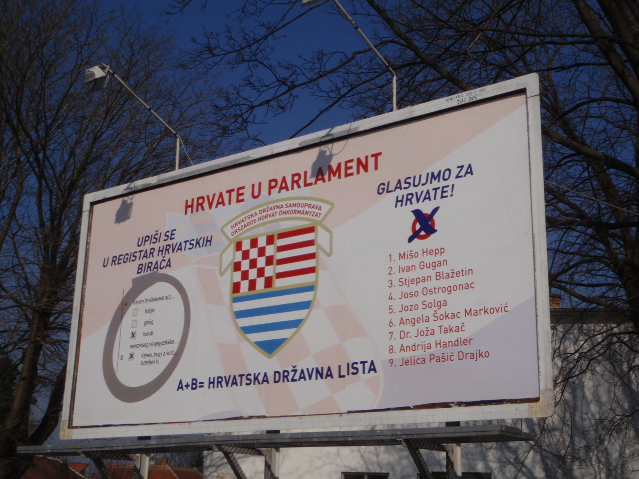 2014-es Parlamenti választási plakát Szombathelyen